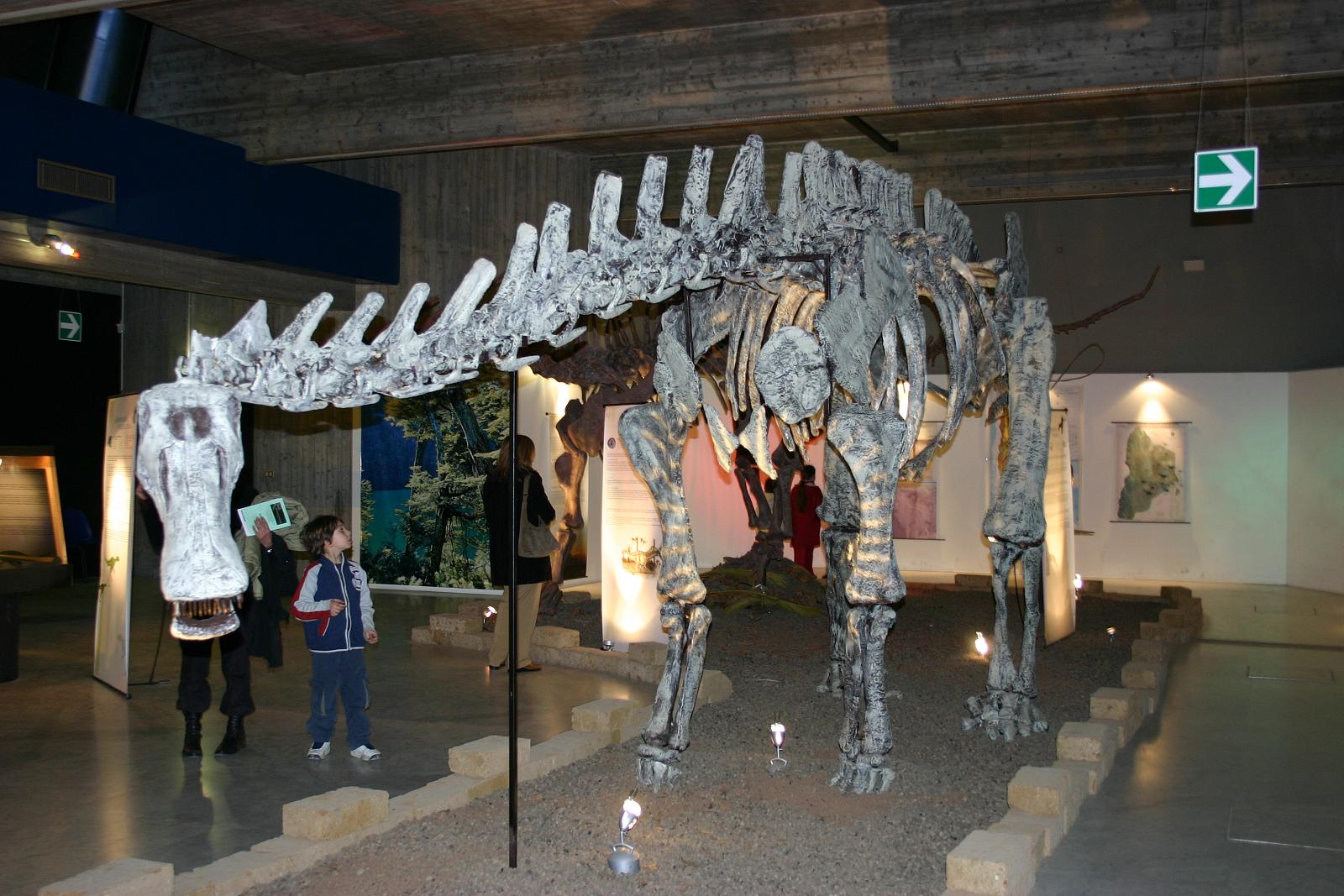 dinosauri 005